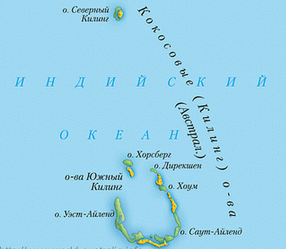 Կոկոսյան կղզիներ